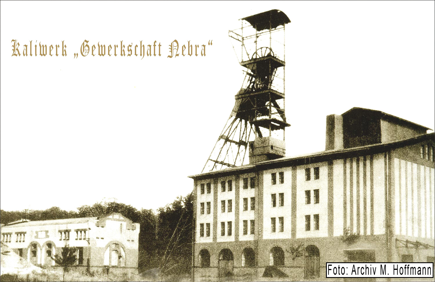 Ansicht der Schachtanlage Nebra um 1920